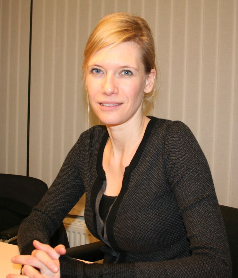 Schauspielerin und Regisseurin Ina Weisse bei der Vorstellung ihres Spielfilms "Der Architekt" im Mannheimer Cineplex